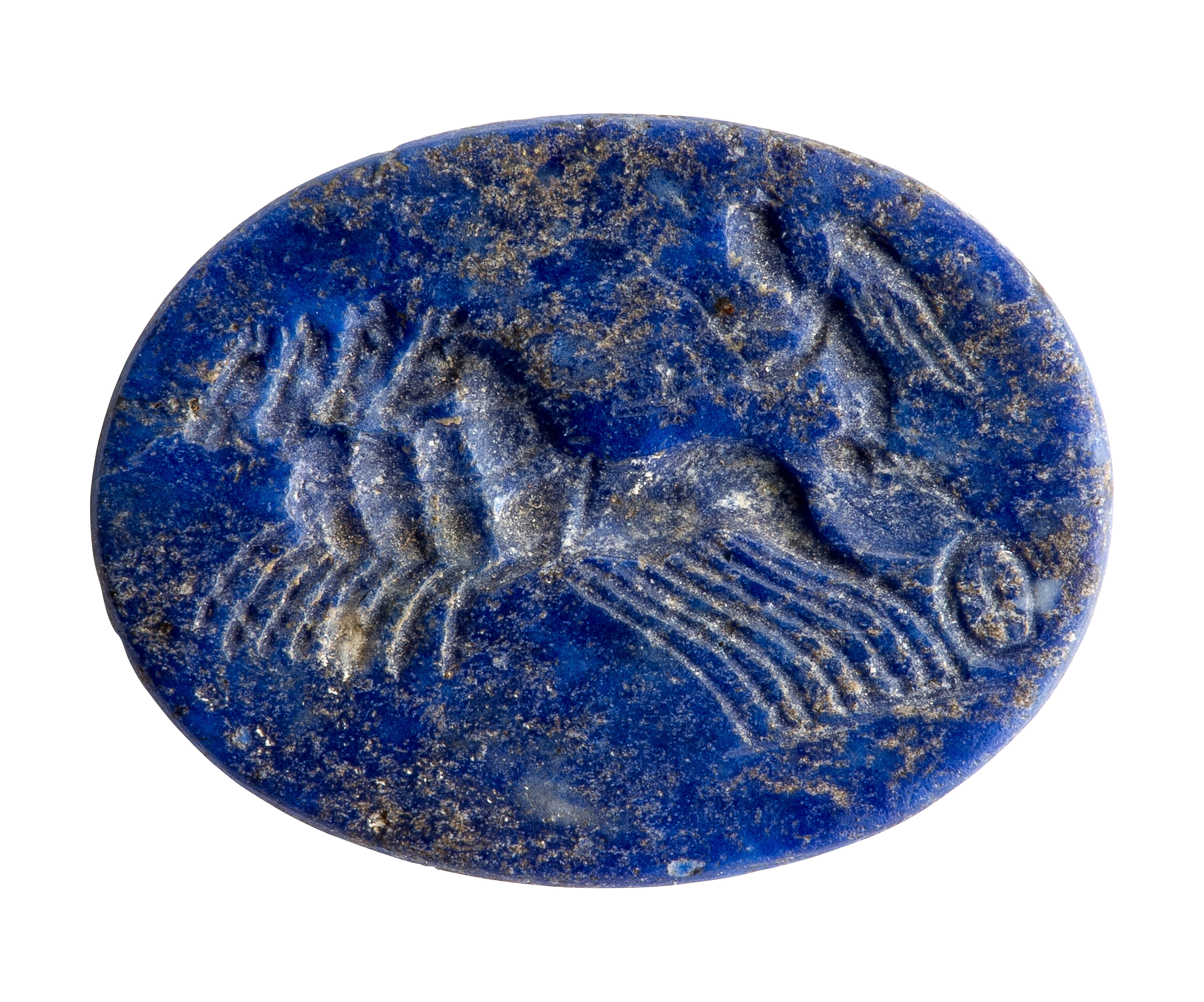 Intaglio in lapis lazuli of lazuliet met afbeelding van Victoria, 100 tot 200 NC, vindplaats: Tongeren, Paspoel, zuidwestgrafveld, losse vondst, collectie Gallo-Romeins Museum Tongeren, GRM 5875